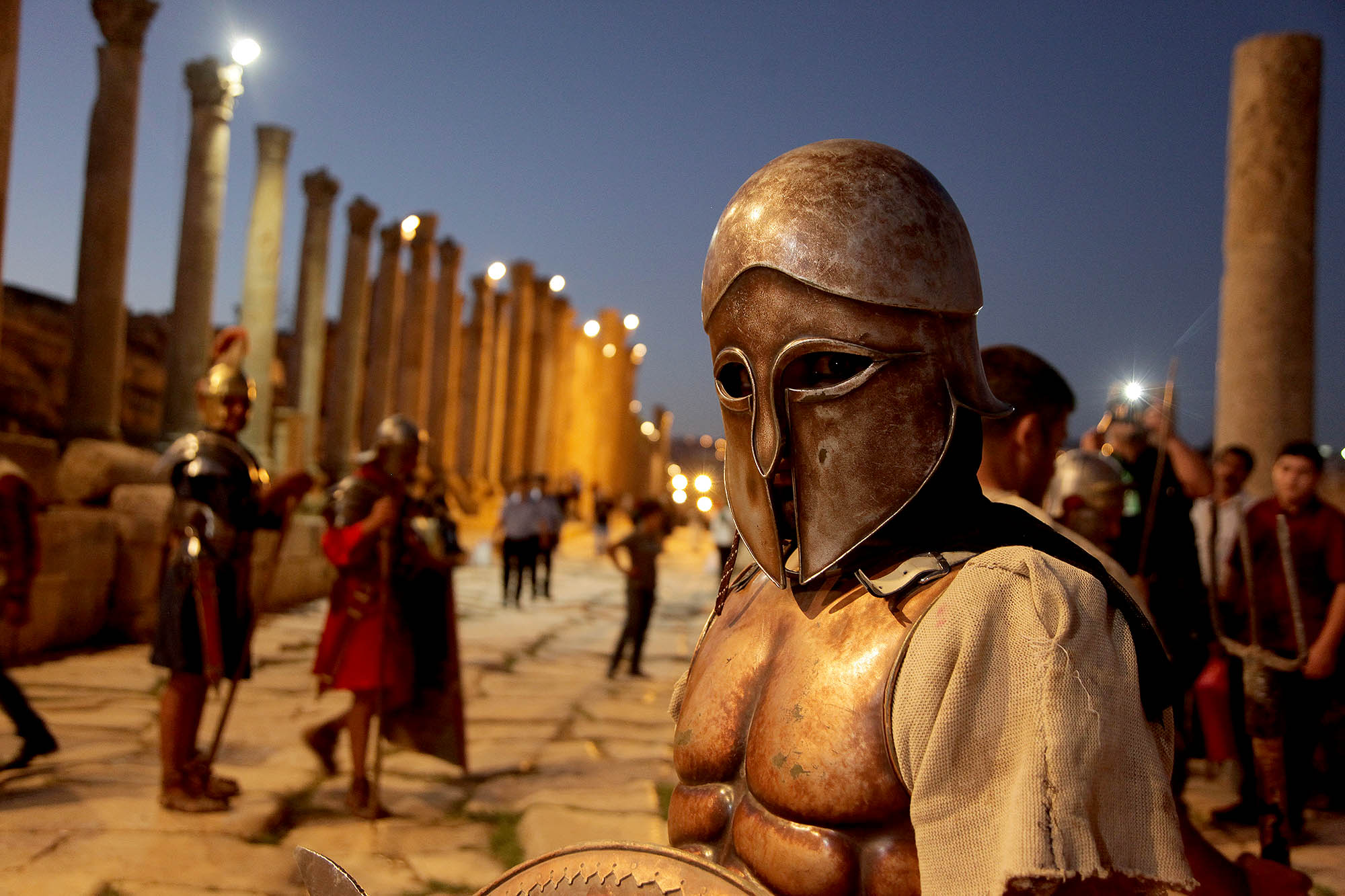 مهرجان جرش 2018 تصوير أحمد عبده الشركة الأردنية للصحافة والنشر الدستور ا